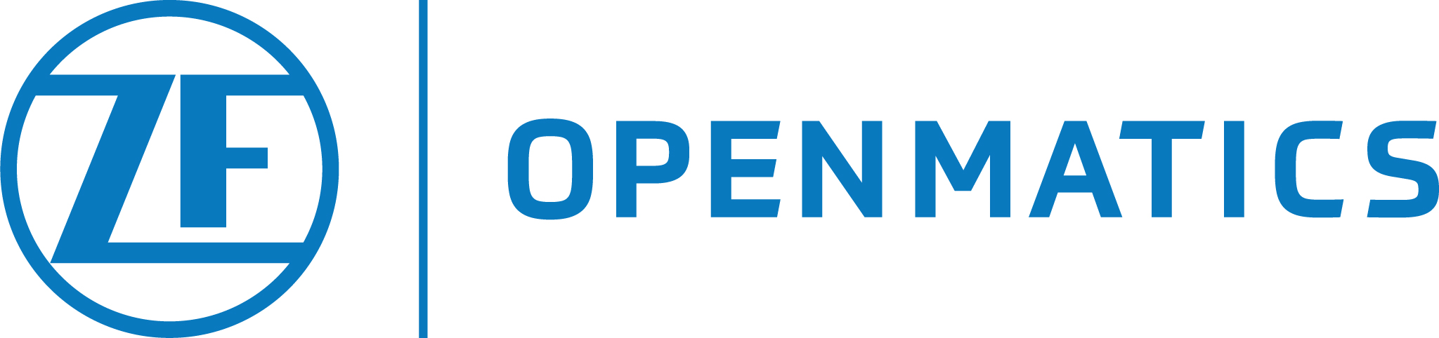 logo